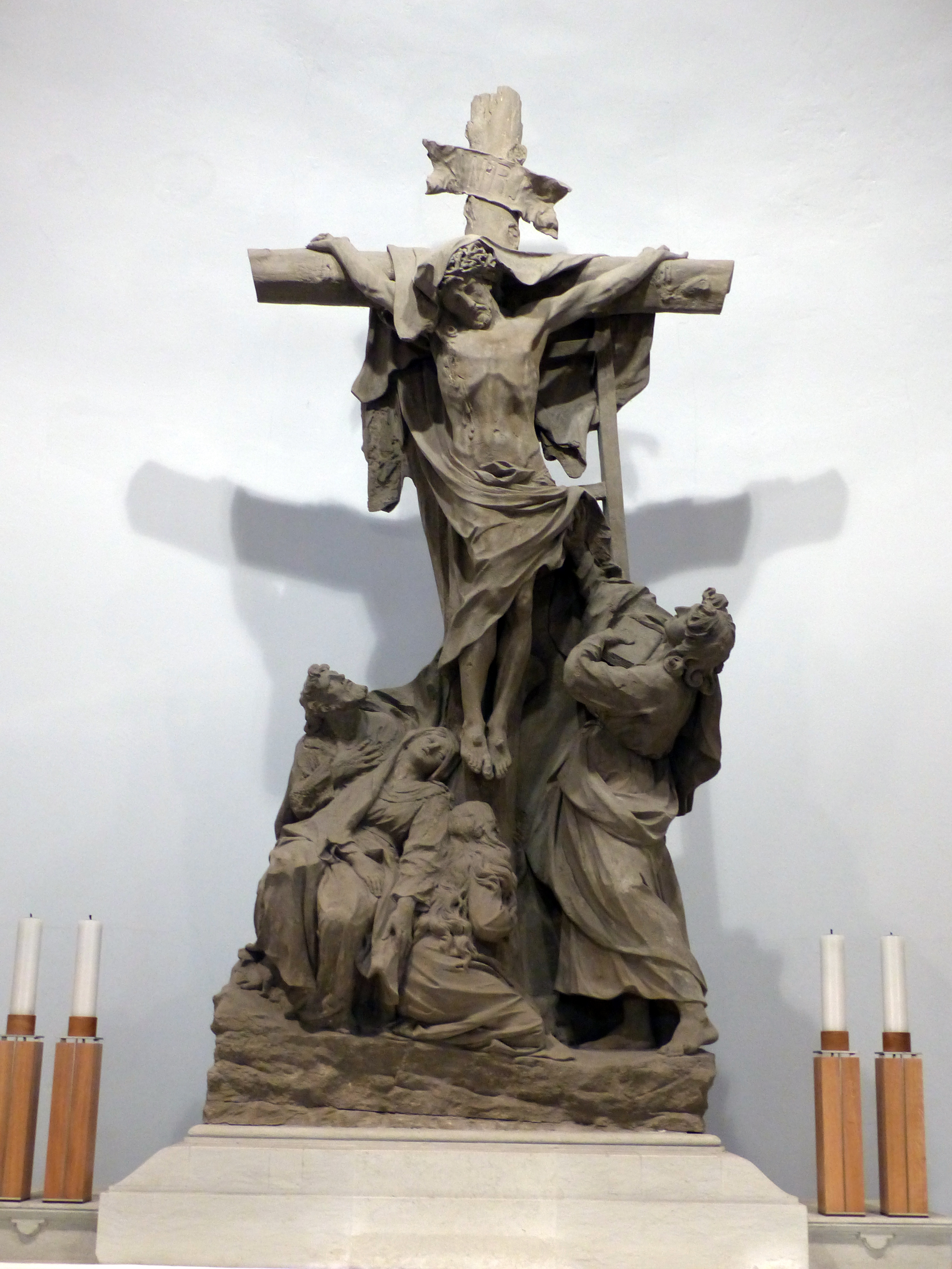 Balthasar Permosers Kreuzigungsgruppe in der Friedhofkapelle auf dem Alten Katholischen Friedhof, Friedrichstraße 54, Dresden